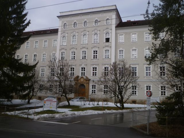 Erzbischöfl. Kollegium (Privatgymnasium) Borromäum